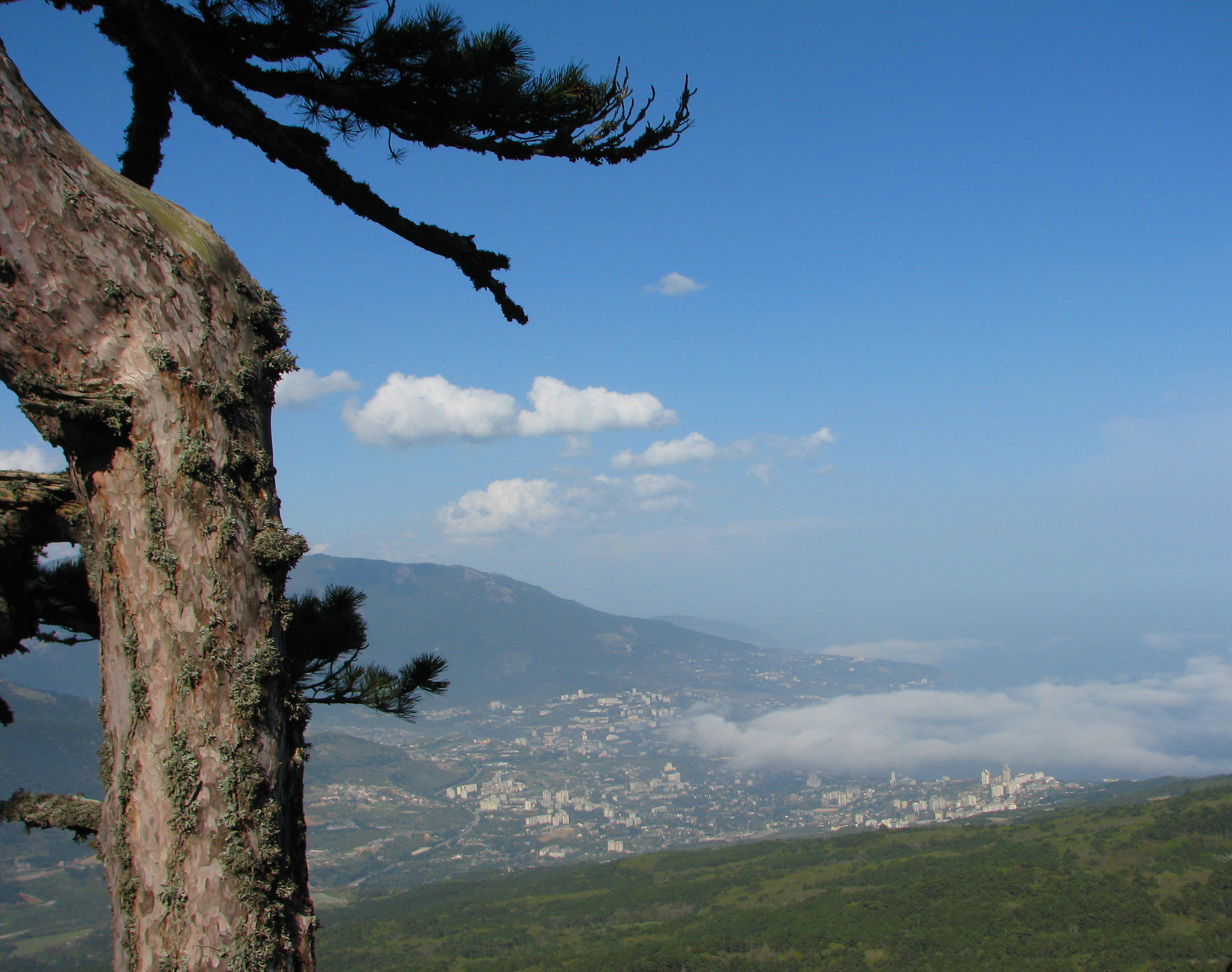 Вид на Ялту с горы Ай-Петри, Крым